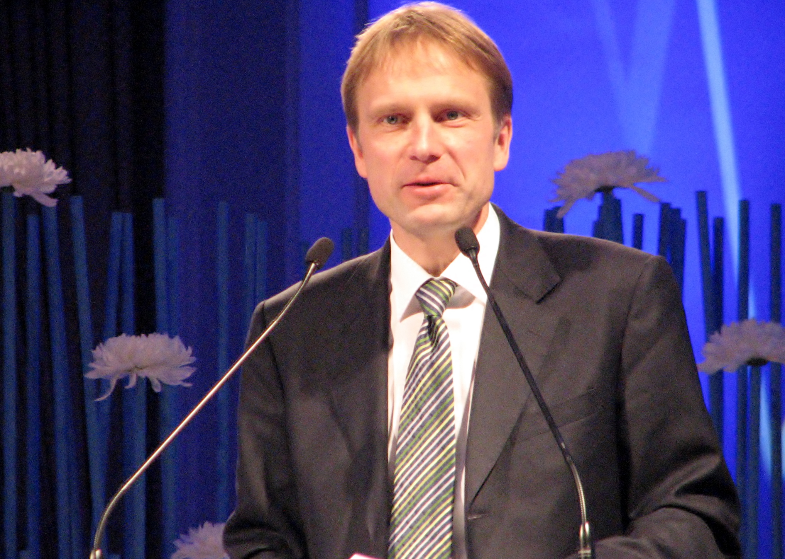 Eerik-Niiles Kross esinemas Estonia kontserdisaalis konverentsil "ERSP 25 – milleks meile erakonnad?"